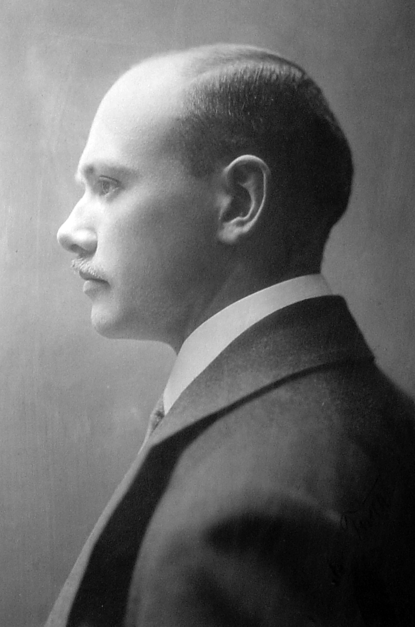 Předeseda ČŠK Riegel v letech 1910-1921.